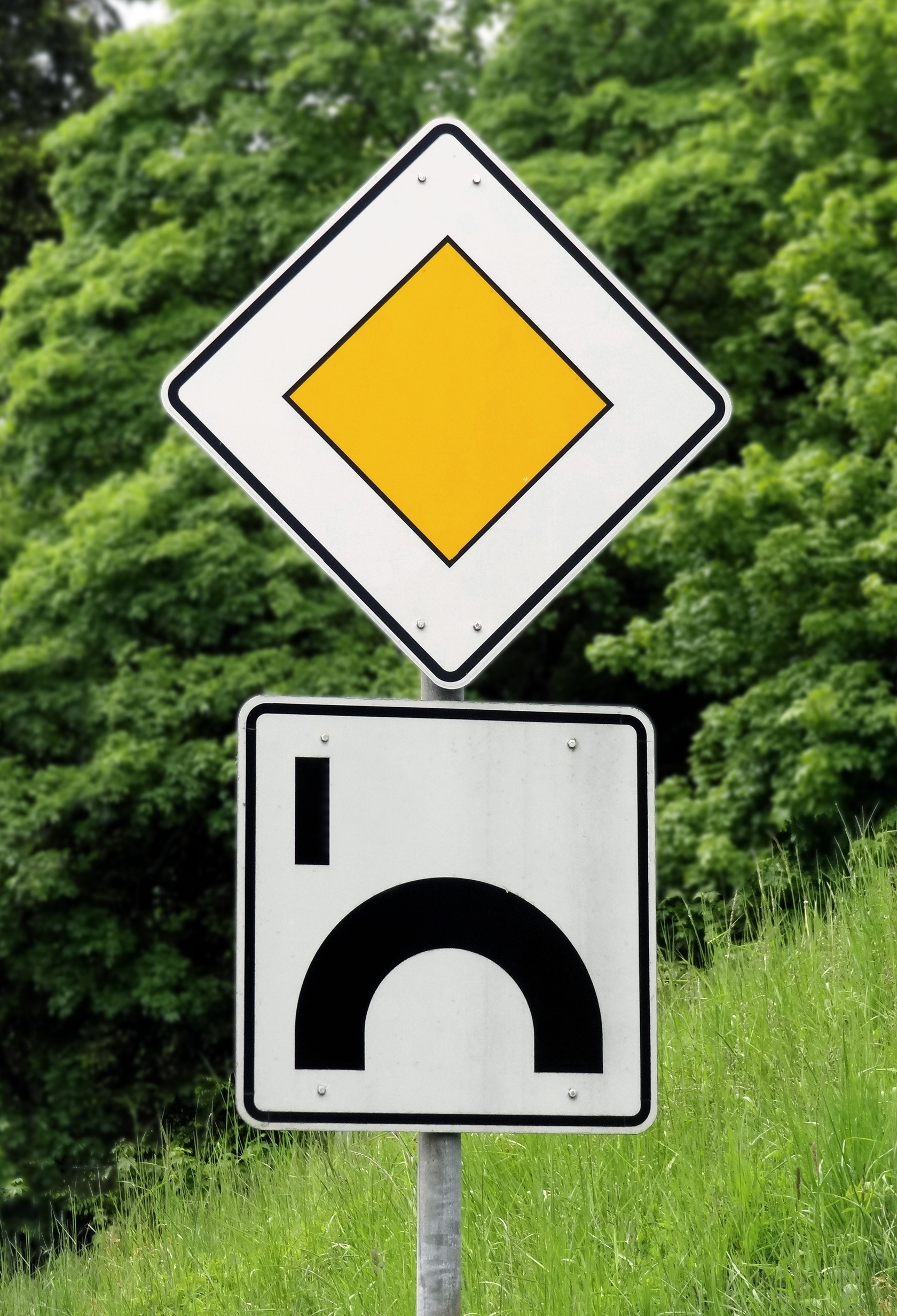 Verlauf der Vorfahrtstraße, Kehre einer Serpentine zum Großen Feldberg (Taunus)